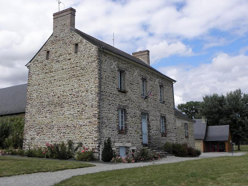 Mairie d'Arbrissel (35).